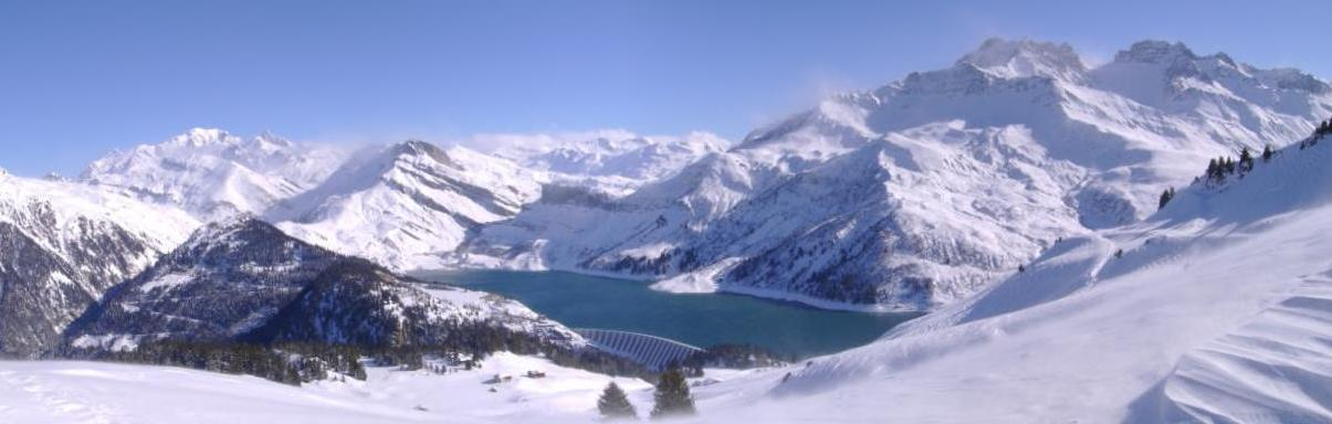 Le lac de Roselend (Beaufortain, Savoie) depuis les alentours du Col du Pré / Roselend dam (Beaufortain, Savoie, France)